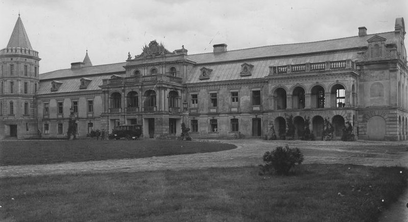 Палац Ледуховських. Смордва.